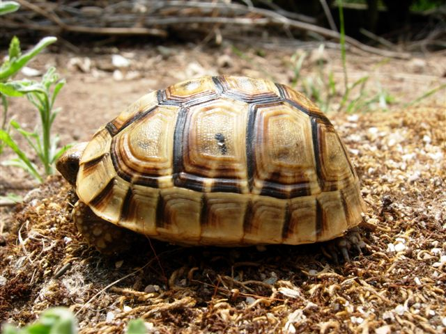 Testudo graeca sarda